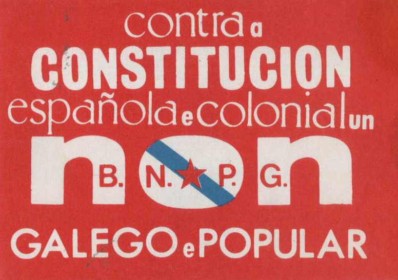 Pegata BN-PG